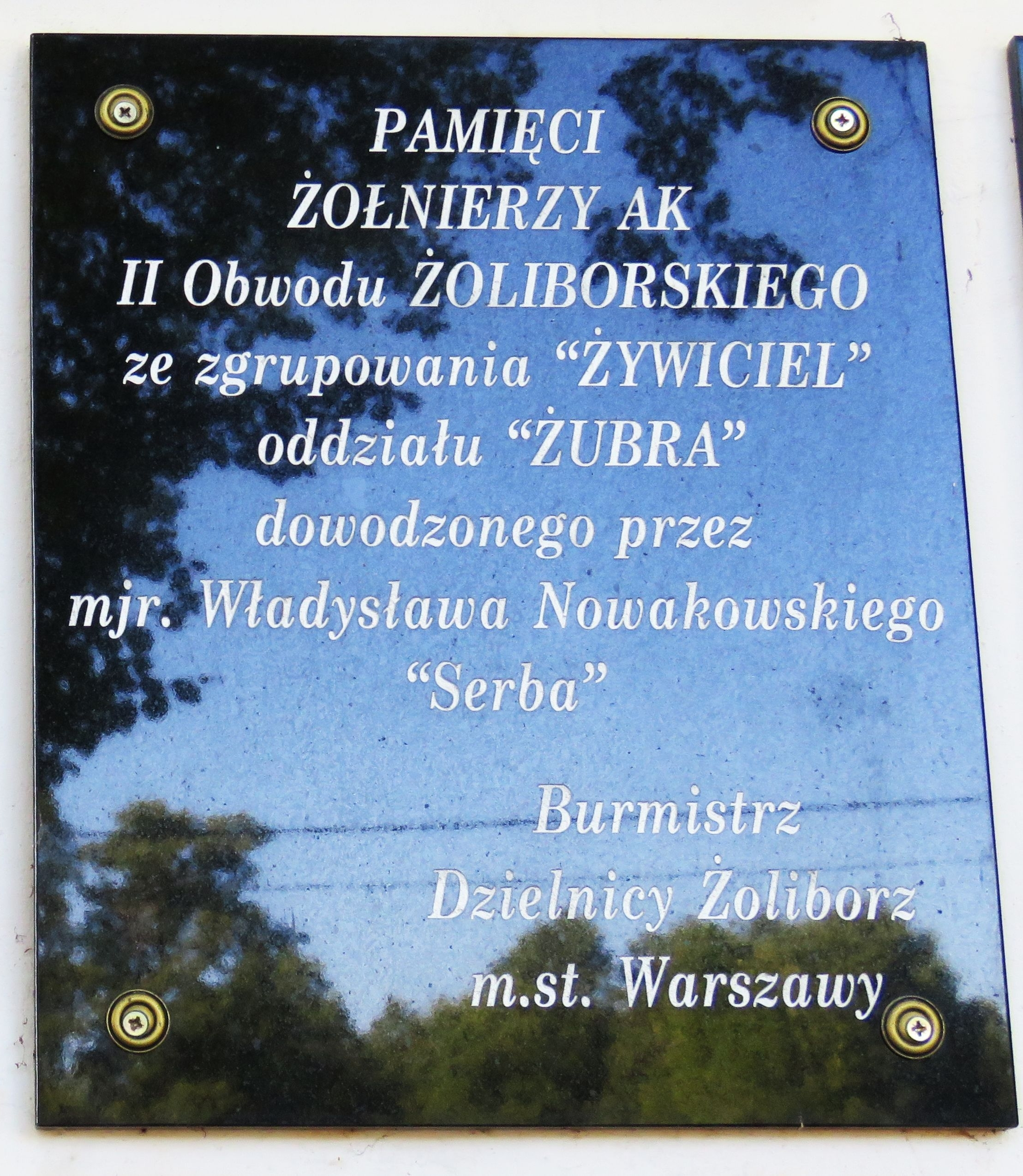 Kościół p.w. Św. Maksymiliana Marii Kolbe TABLICA NA KOŚCIELE 05